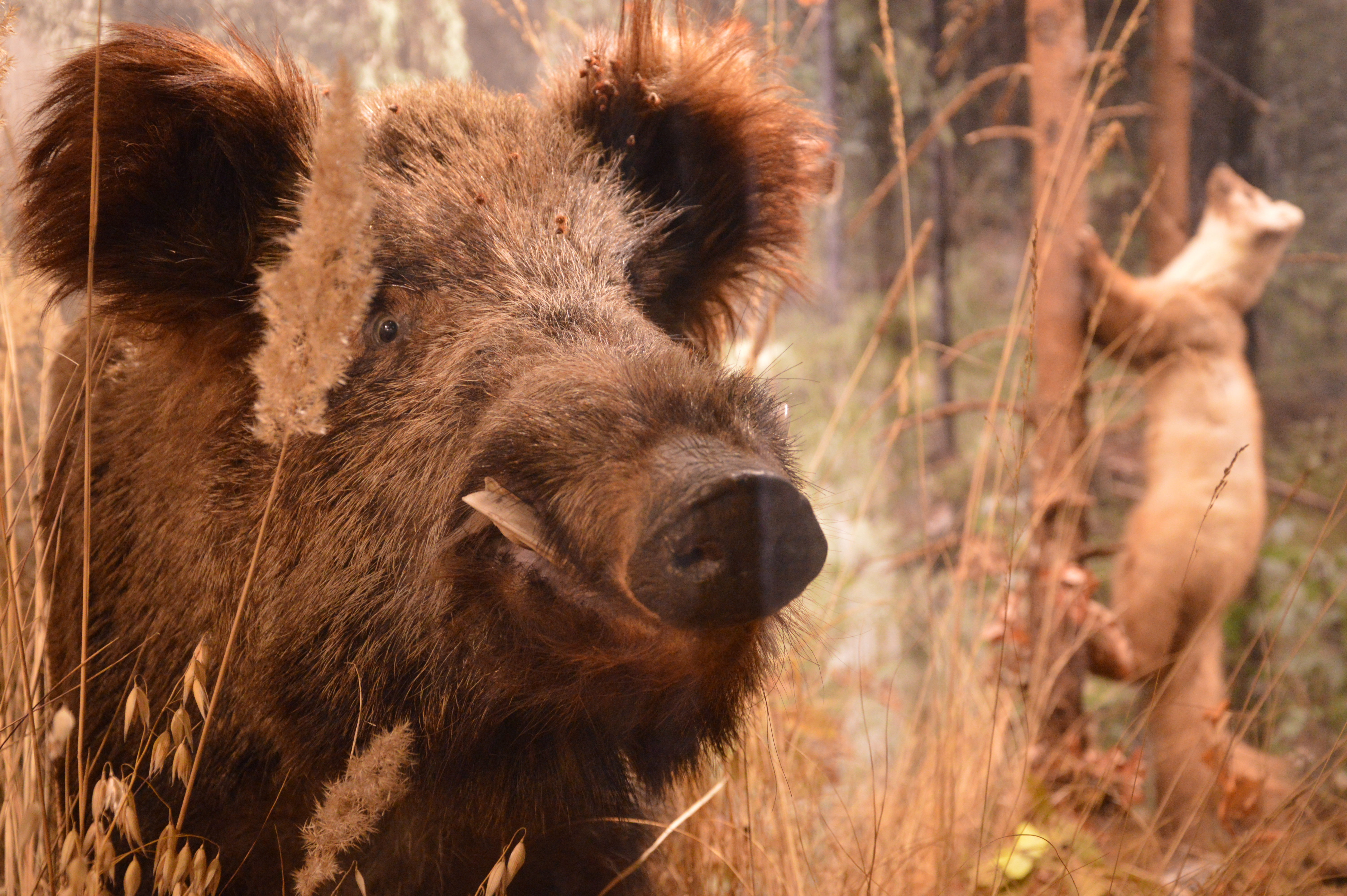 Tartu Ülikooli loodusmuuseum